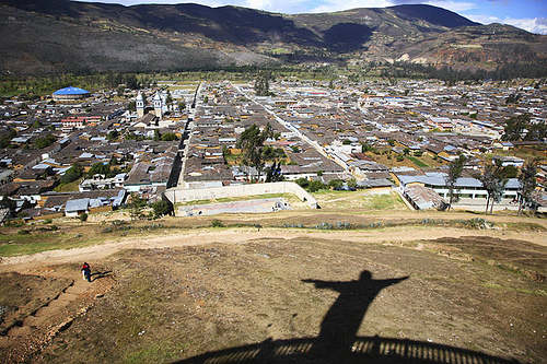 Celendín Visto desde "EL MIRADOR" de San Isidro